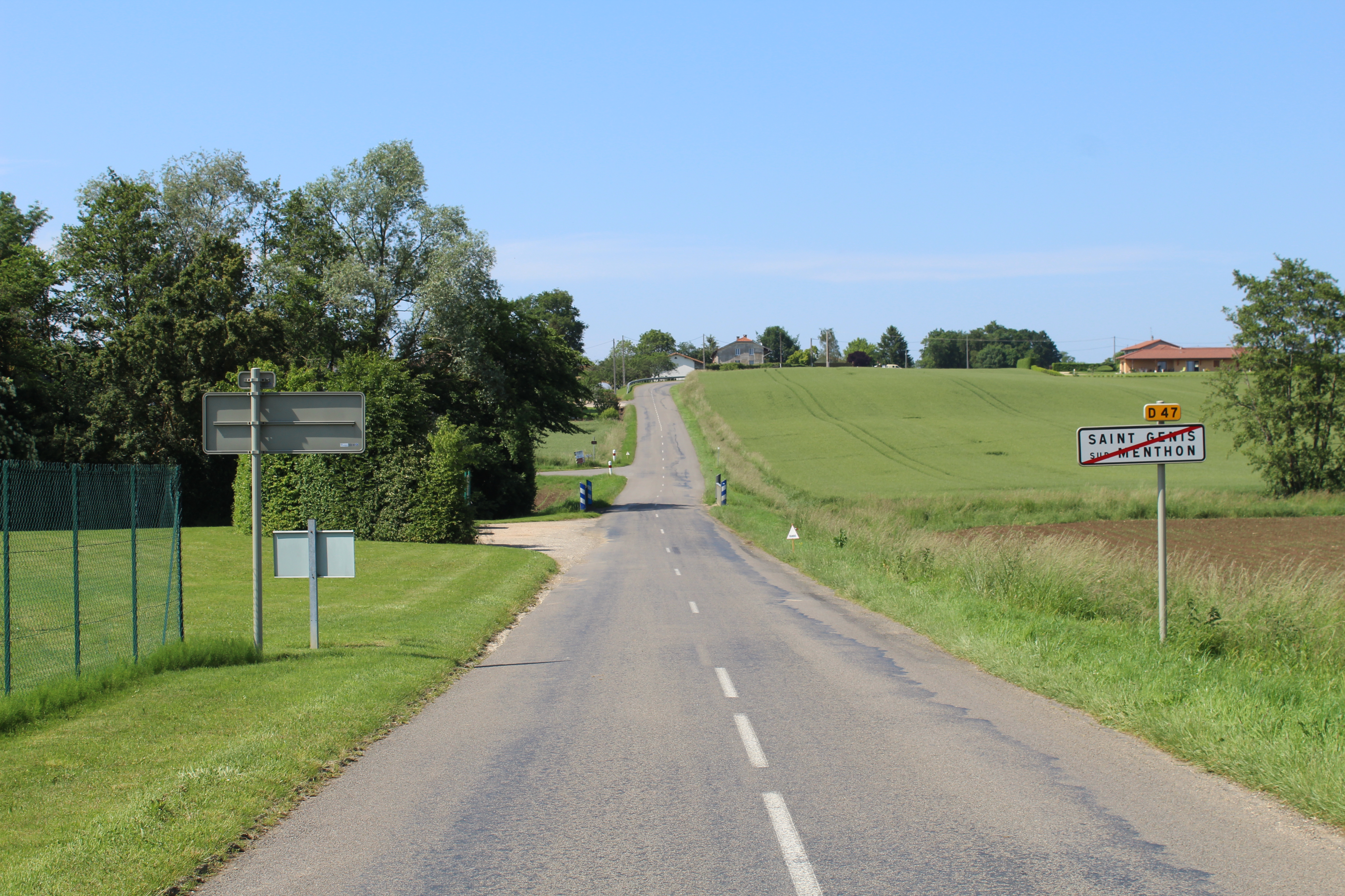 La route départementale D47 à la sortie de Saint-Genis-sur-Menthon.